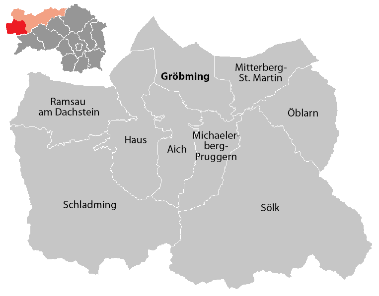 Gemeinden in der Politischen Expositur Gröbming im Bezirk Liezen (Steiermark), Stand: 1. Januar 2015